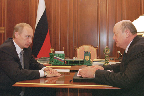 МОСКВА, КРЕМЛЬ. С директором Федеральной службы налоговой полиции Михаилом Фрадковым.